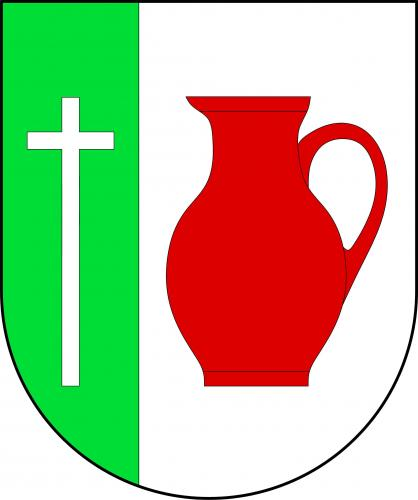 Mezouň znak